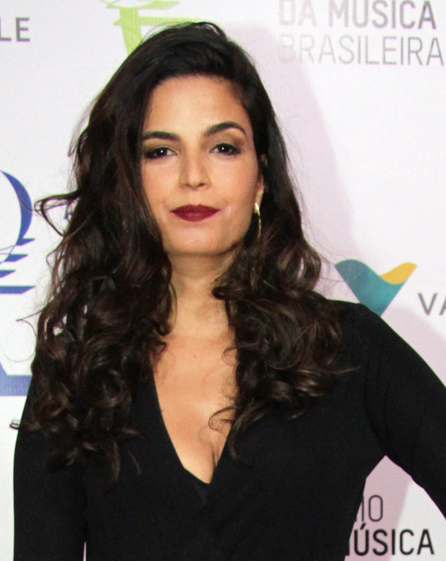 Emanuelle Araújo - 26° Prêmio da Música Brasileira 2015, no Theatro Municipal, no Centro do Rio de Janeiro/RJ. (10/06/15) Foto: Roberto Valverde/Divulgacão